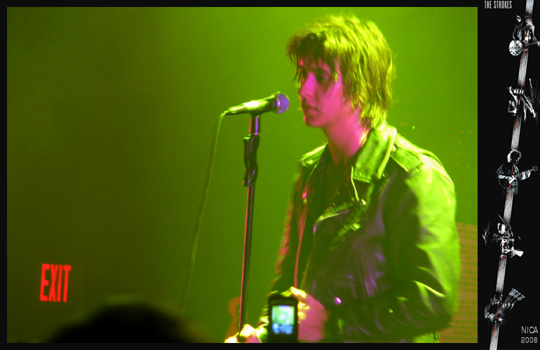 Strokes1